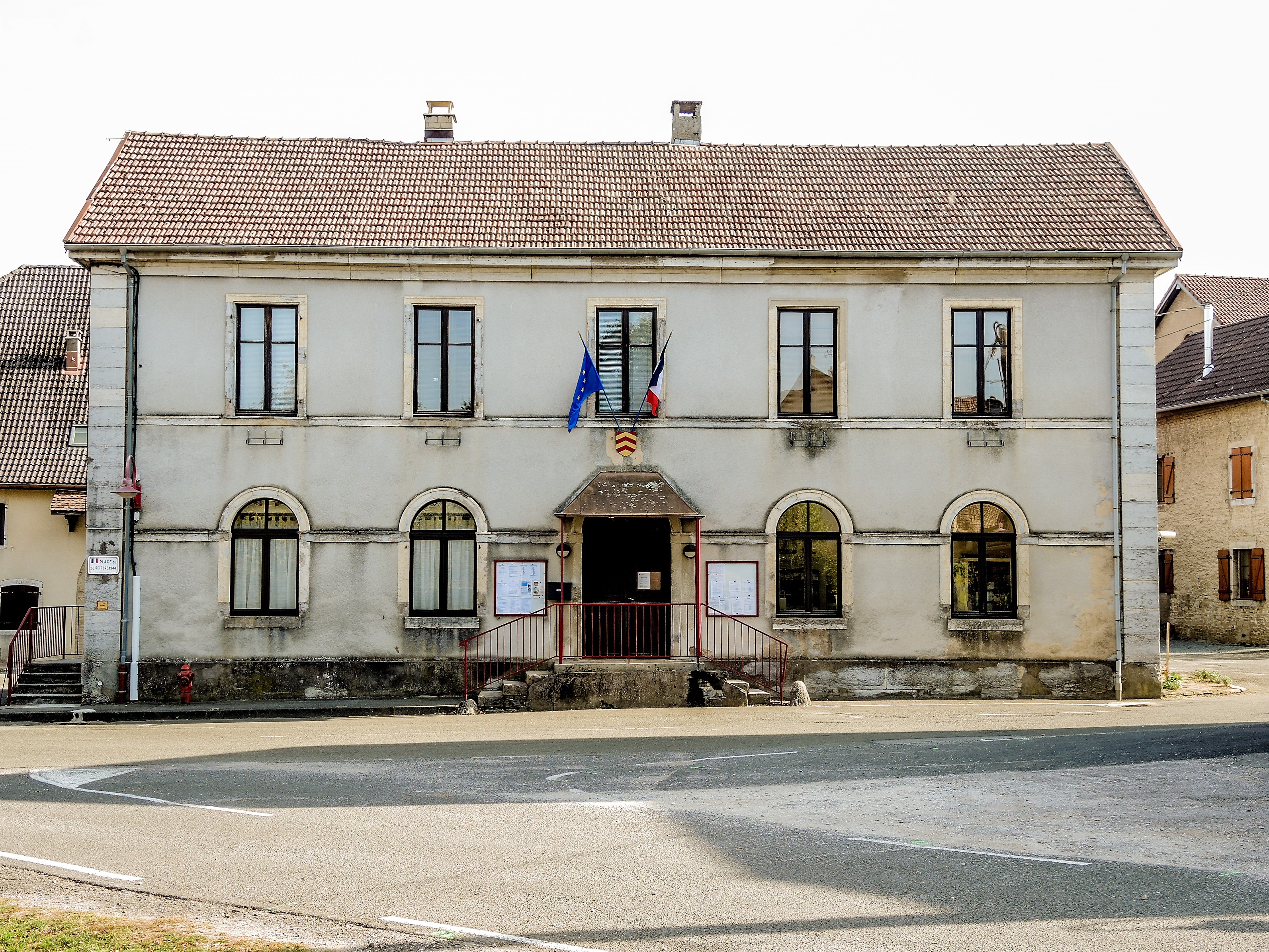 Façade de la mairie de Présentevillers. Doubs